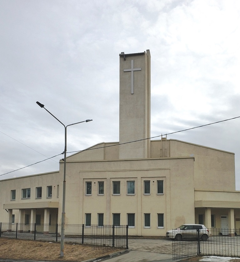 Евангелическо-лютеранский приход Святого Духа в Петрозаводске на Древлянской набережной.